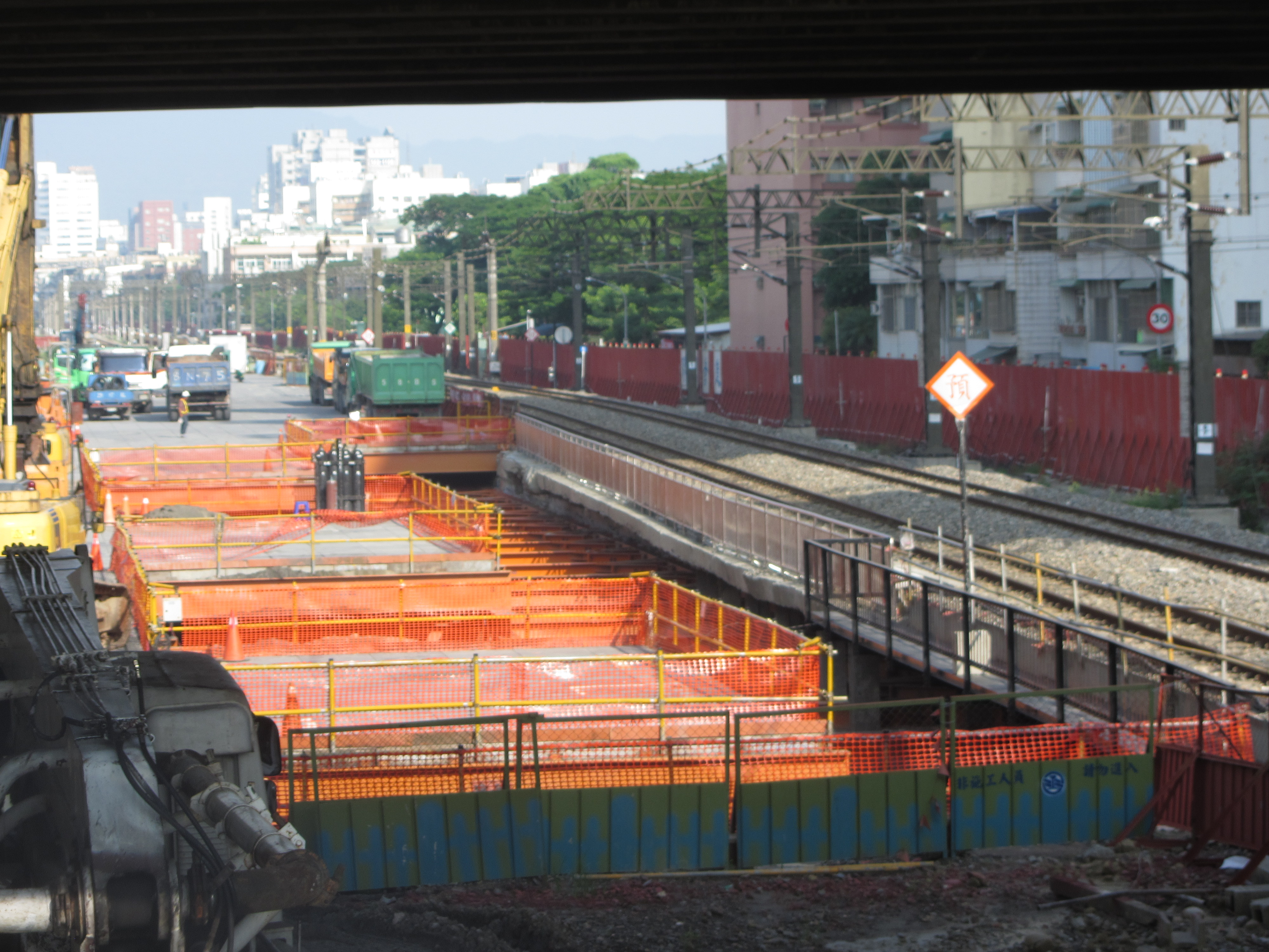 進行建設中的台鐵科工館車站，2013年攝。